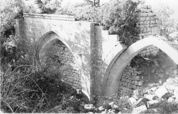 Église du Fort de Buoux, Vaucluse, en 1960. Vue de la corniche moulurée marquant le départ de la voûte.